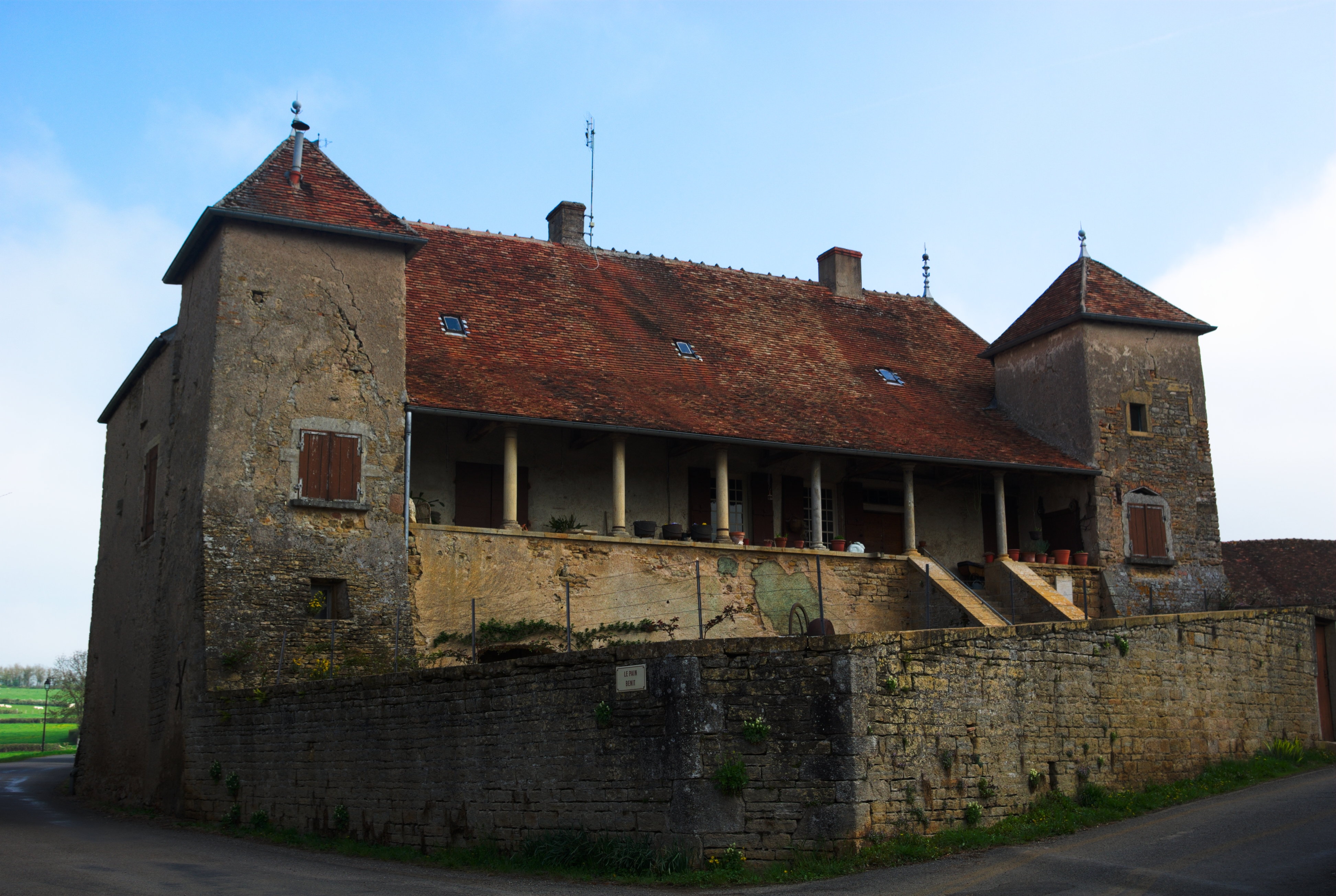 Maison Monnier